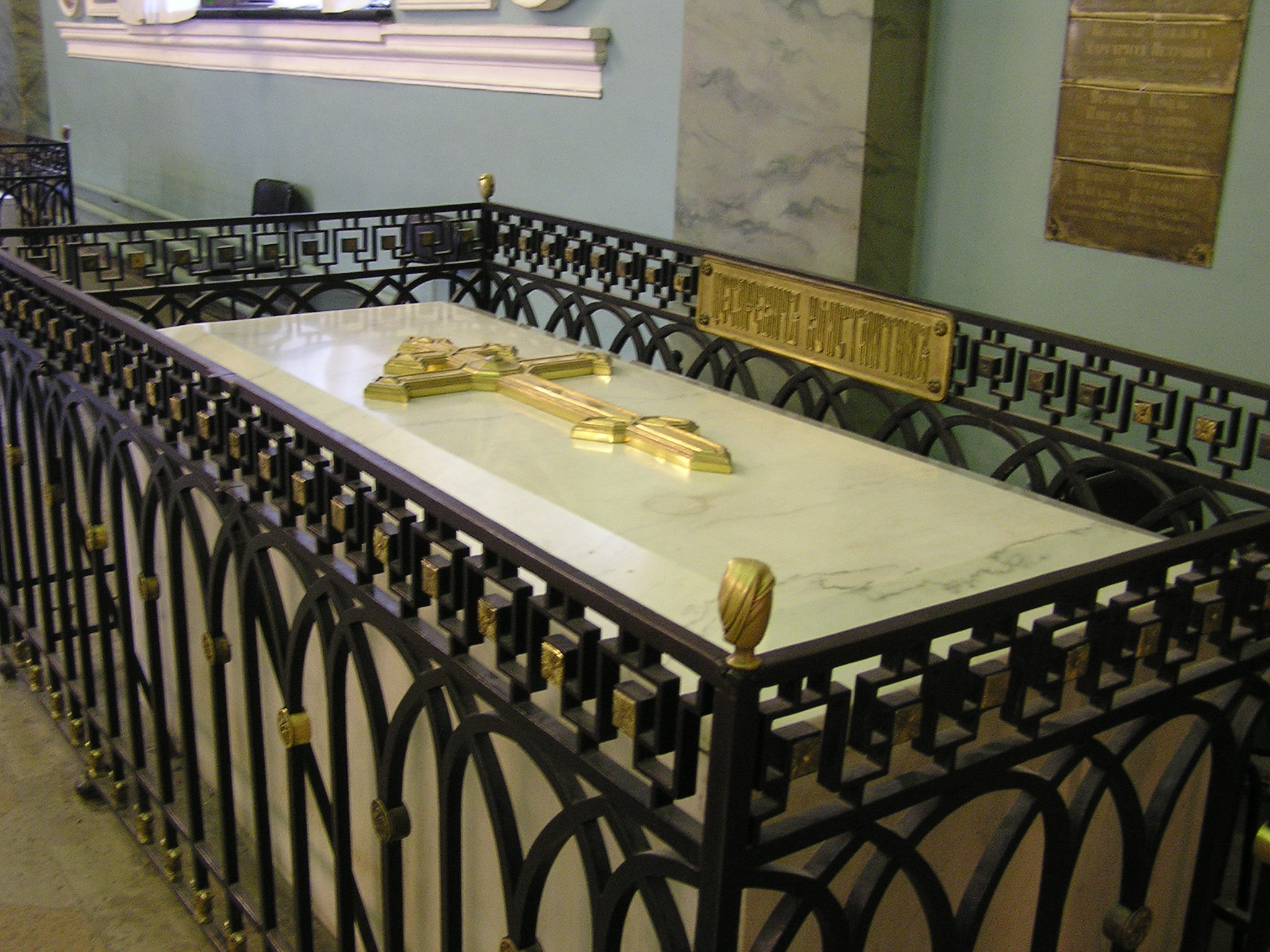 Санкт-Петербург. Петропавловский собор